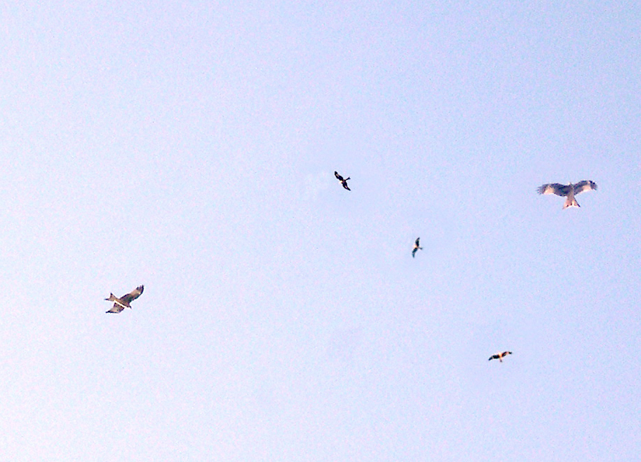 Milano real concentrándose para la invernada en la Tierra de Medina del Campo (Valladolid, España)